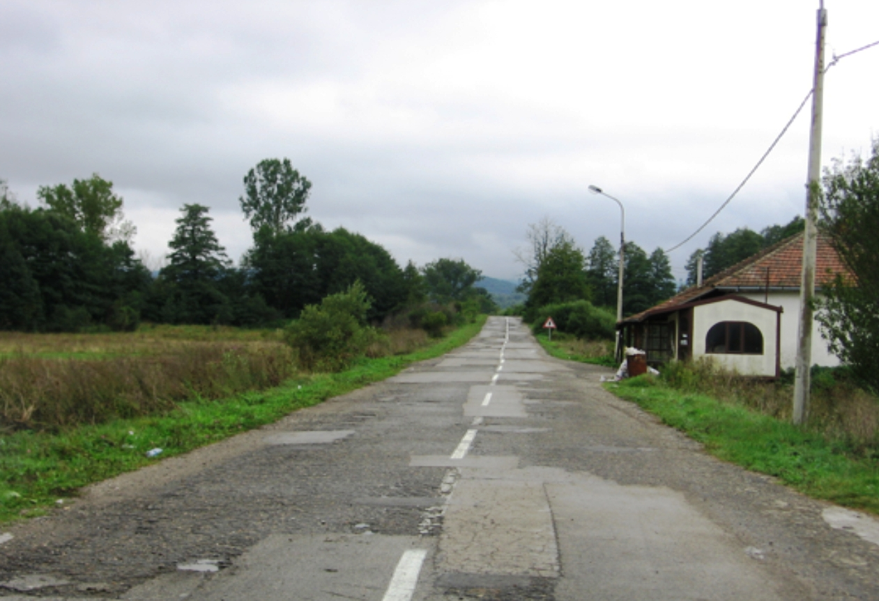 Стрезимировци (Србија).